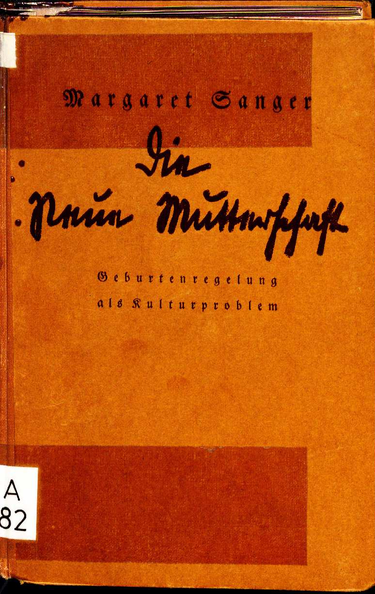 Margaret Sanger Die neue Mutterschaft 1927 Einband